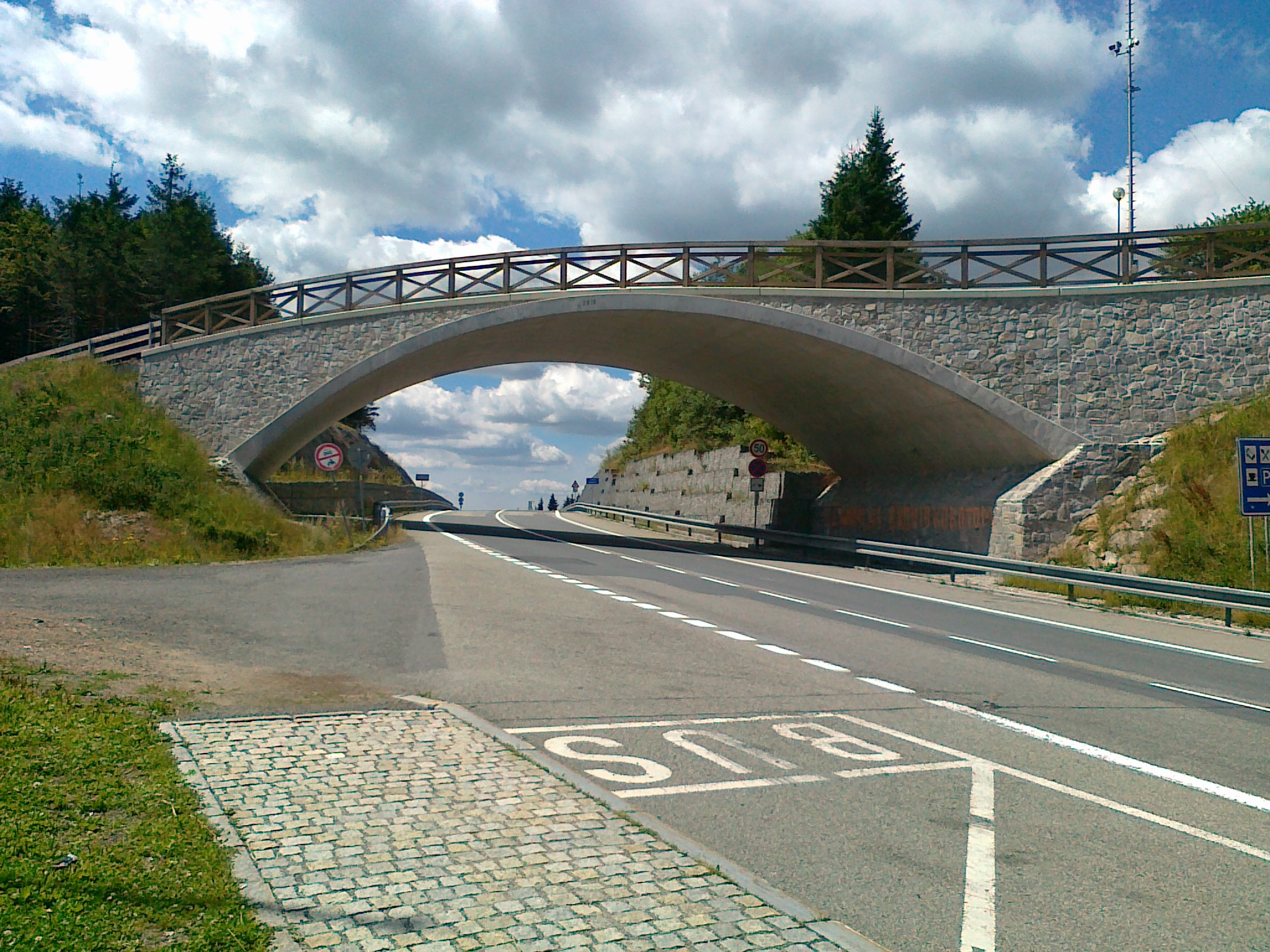 Mostek nad przełęczą Červenohorské sedlo - 1013 m n.p.m.